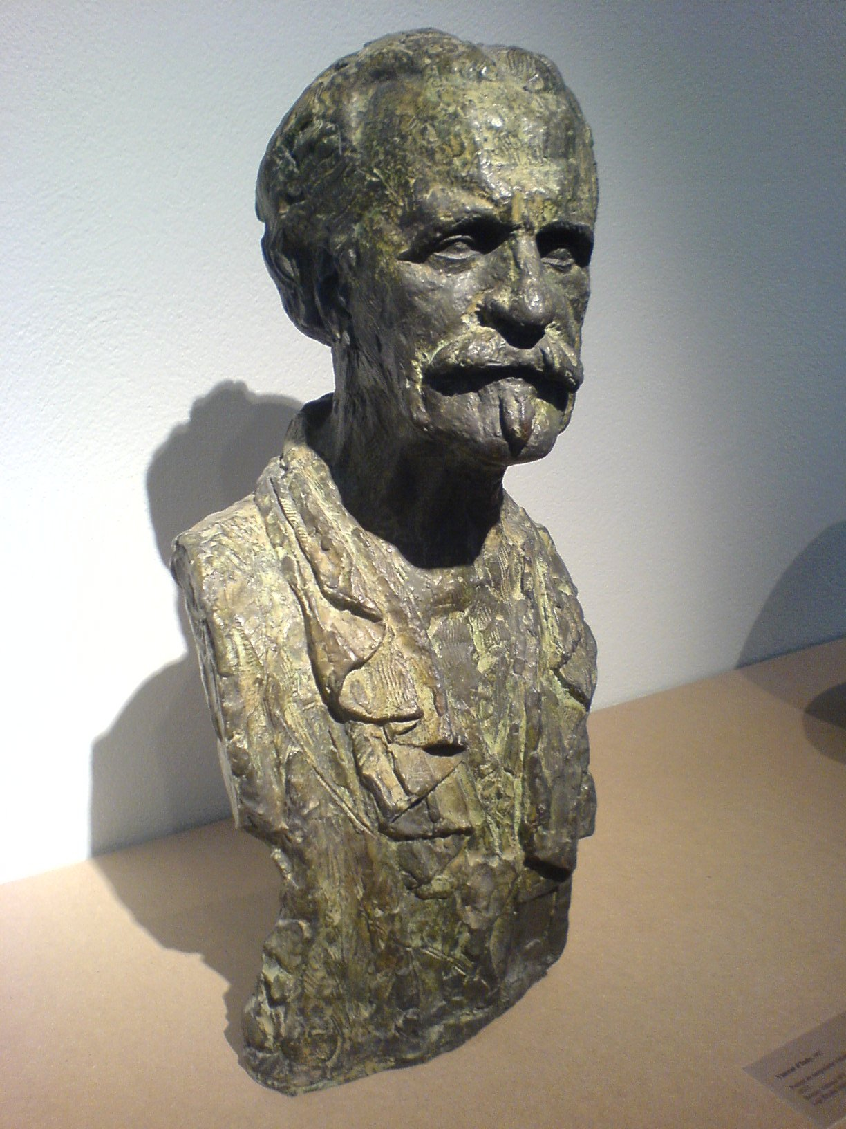 Portrait du compositeur Vincent d'Indy (1851 - 1931) par Antoine Bourdelle au Musée Bourdelle. Bronze, Valsuani N°5 Legs Rhodia Dufet-Bourdelle, 2002 (MB br.1313)